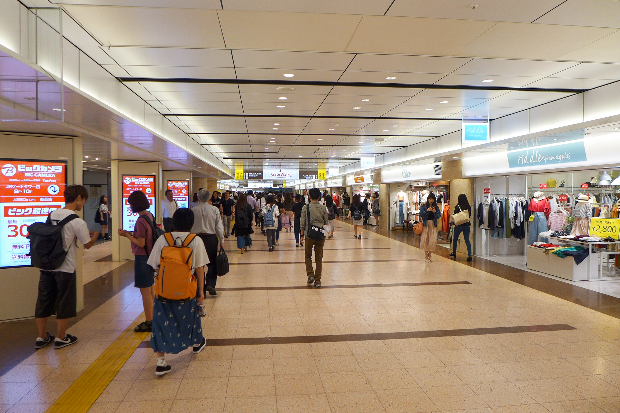 Gatewalk, Nagoya